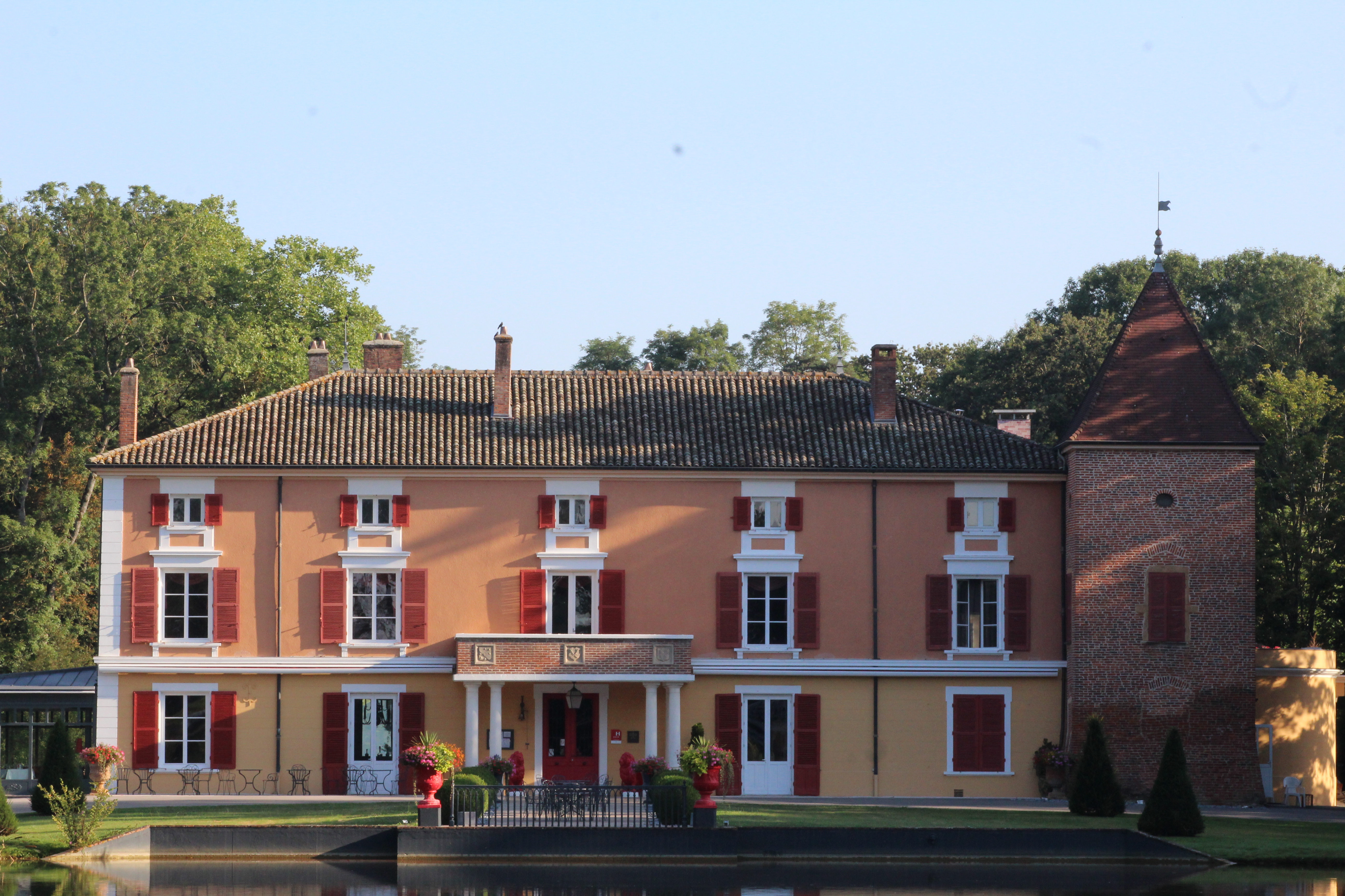 Château d'Épeyssoles à Vonnas.